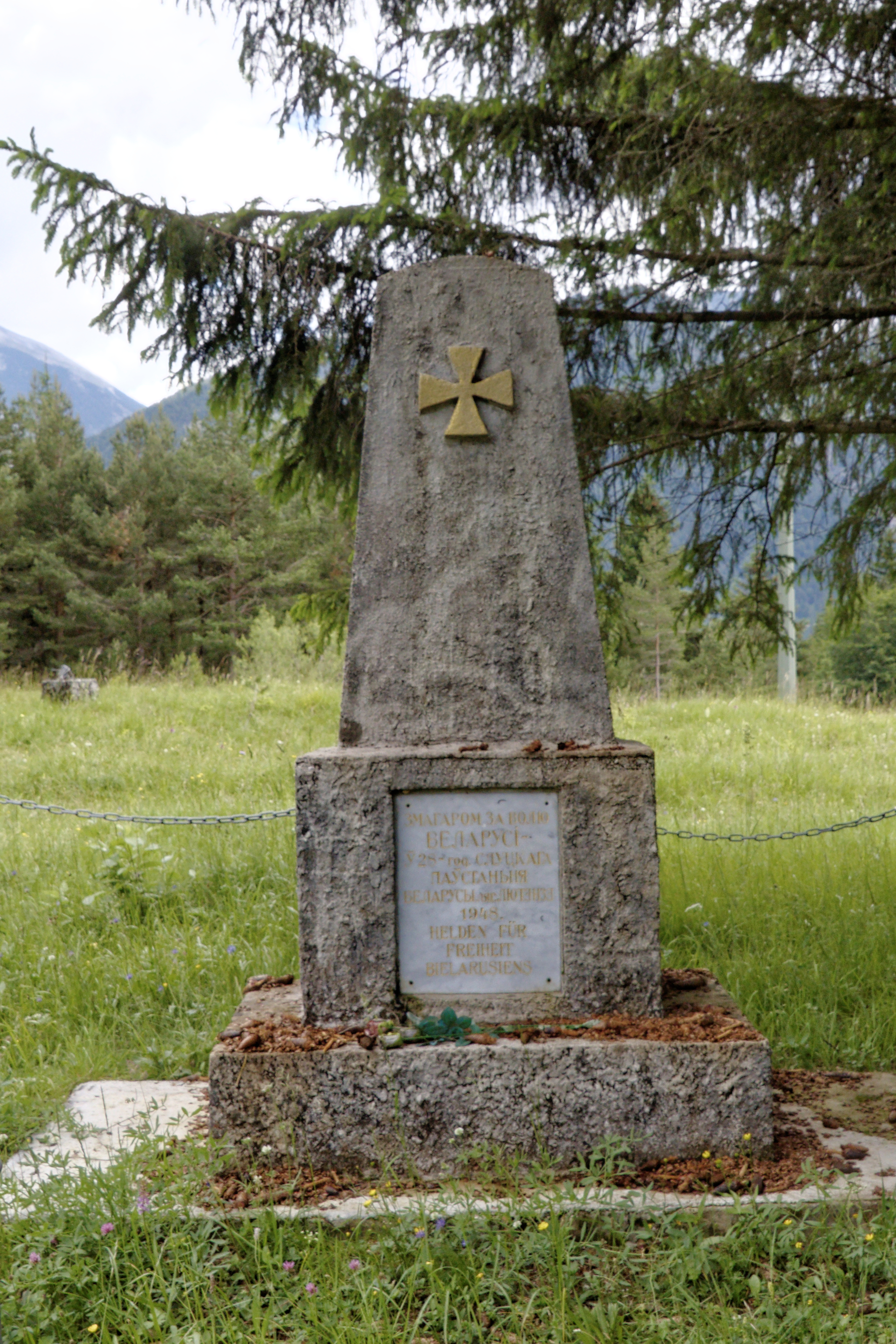 Mittenwald Luttenseekaserne; Denkmal weißrussischer KriegsgefangenerThis is a photograph of an architectural monument.